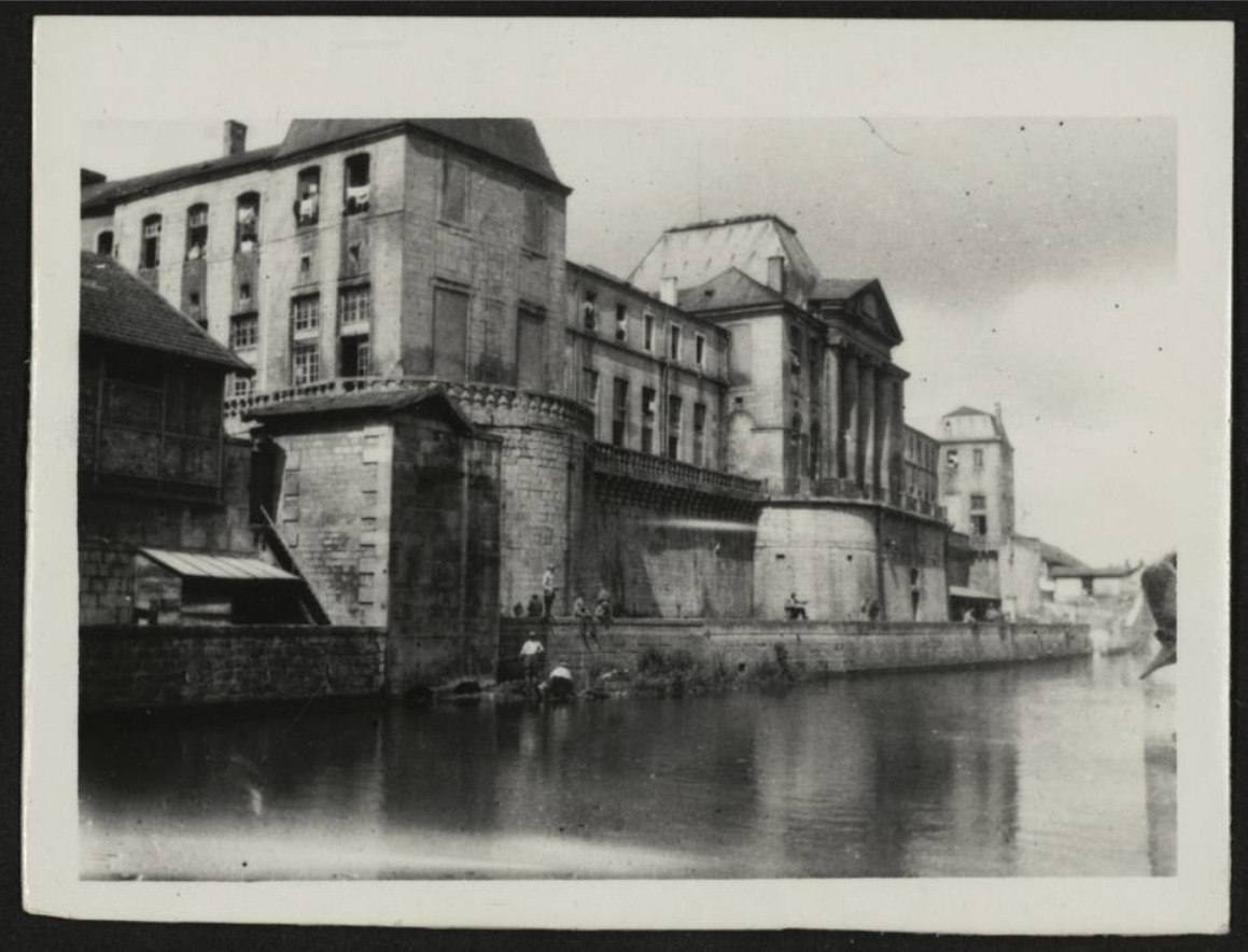 Château de Commercy : caserne Bercheny